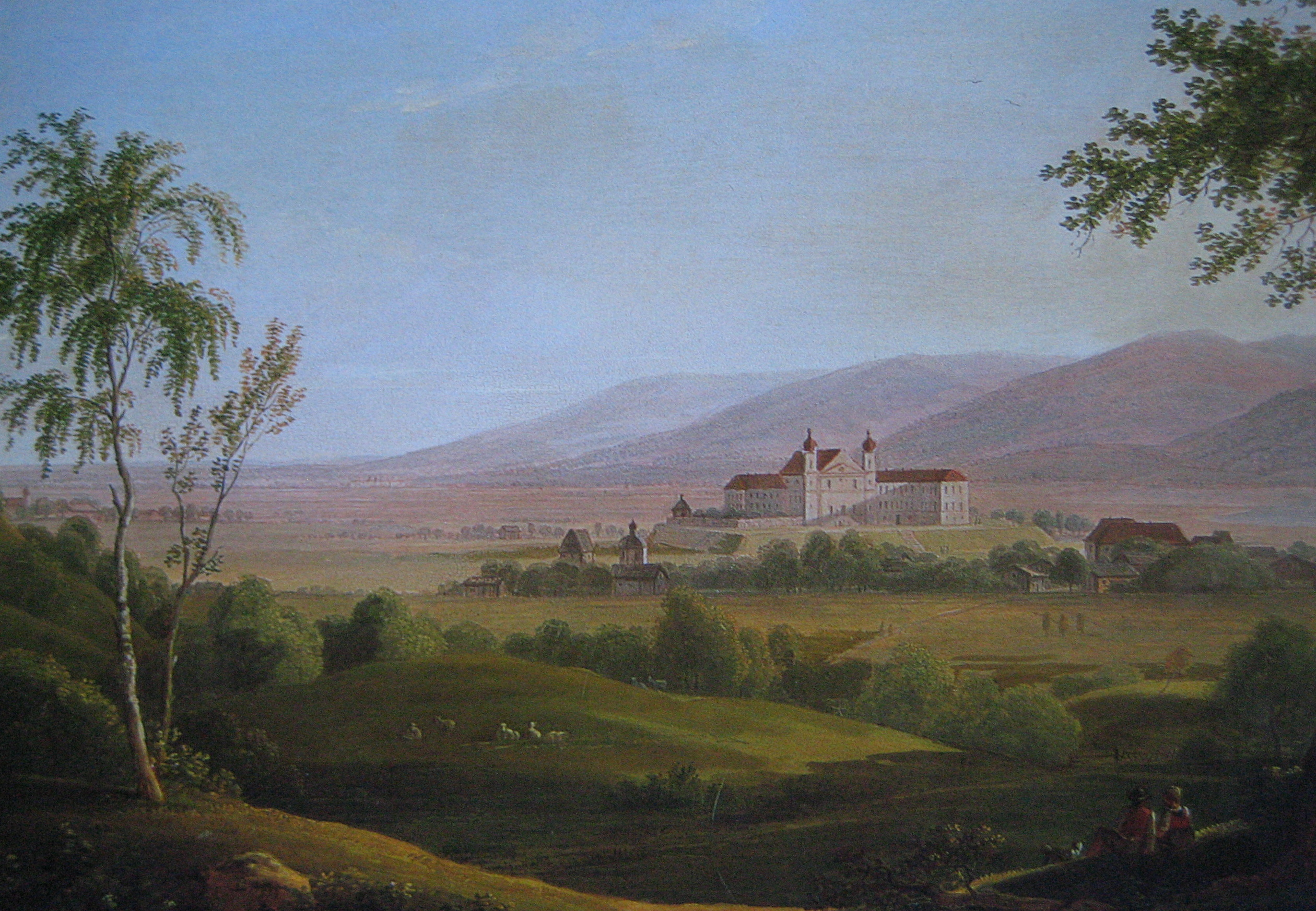 Kloster Schlehdorf, Gemälde von Simon Warnberger (1769 - 1847) 42.6. x 55 cm, Privatbesitz